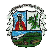 sagrado corazon de jesus,guavirami, y las granjas